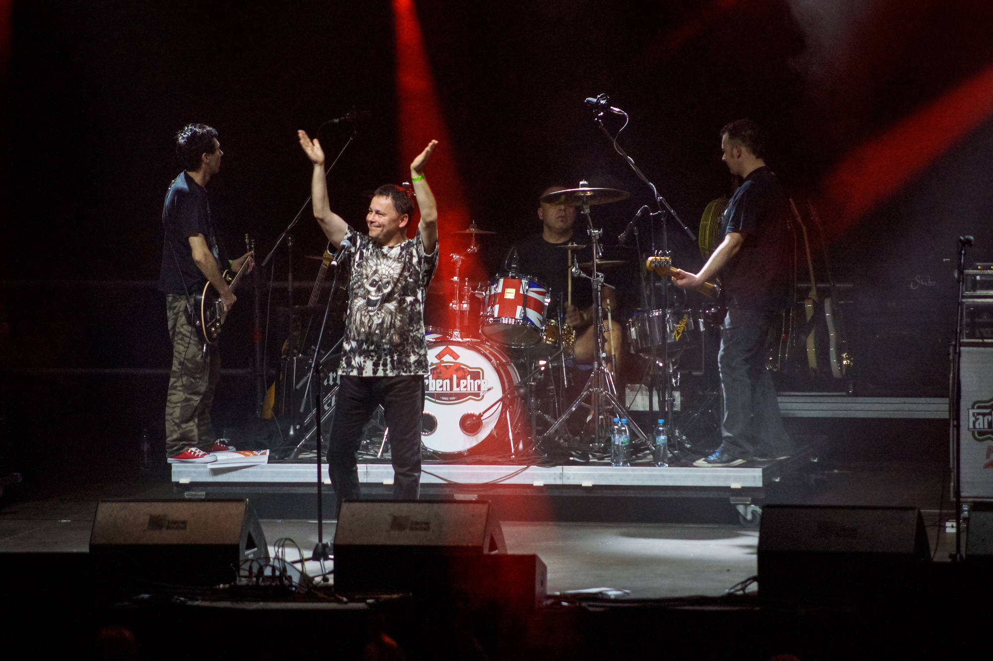 Zespół Farben Lehre podczas Rocket Festiwal 2014 w Warszawie.